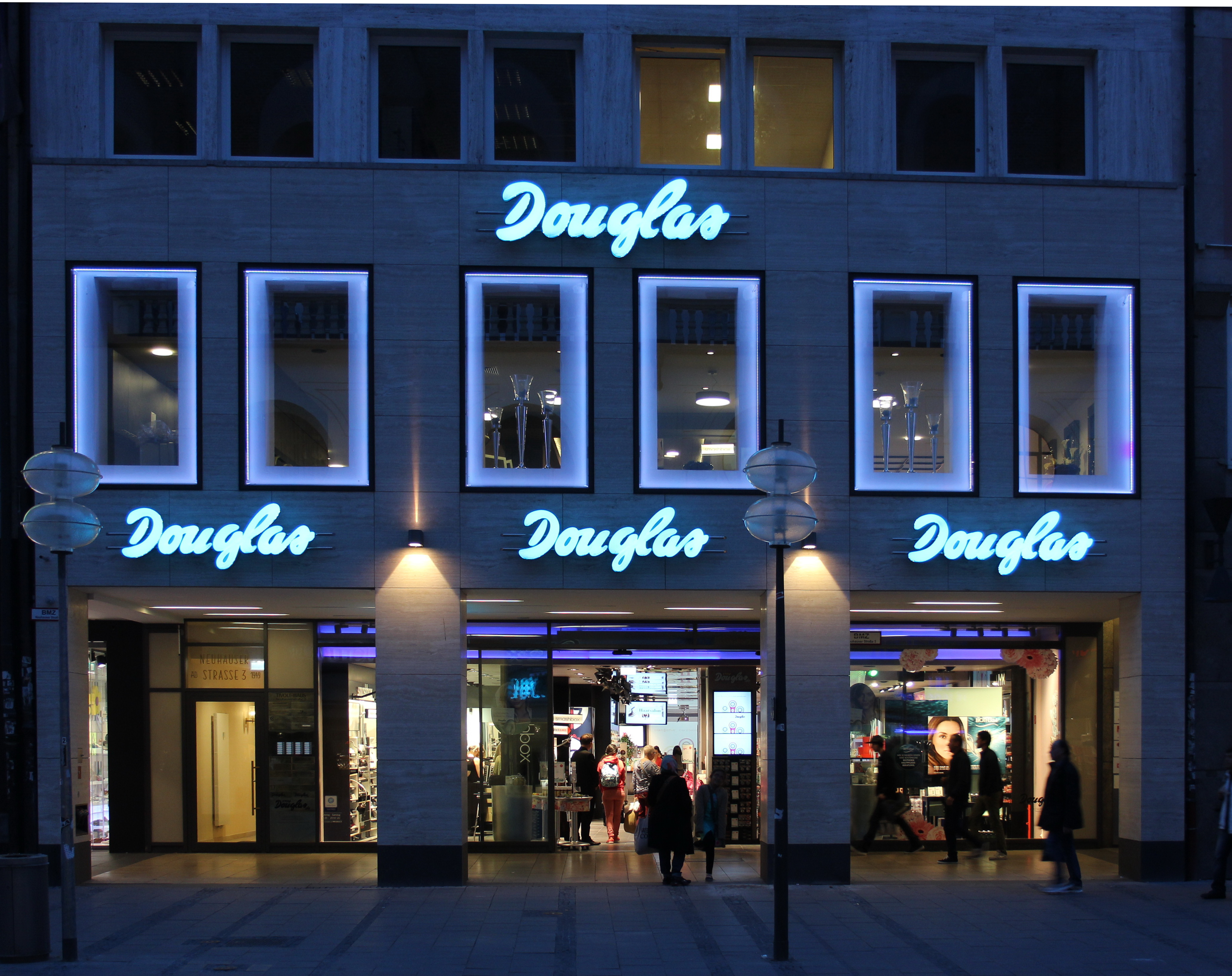 Douglas Filiale in München in der Kaufingerstraße